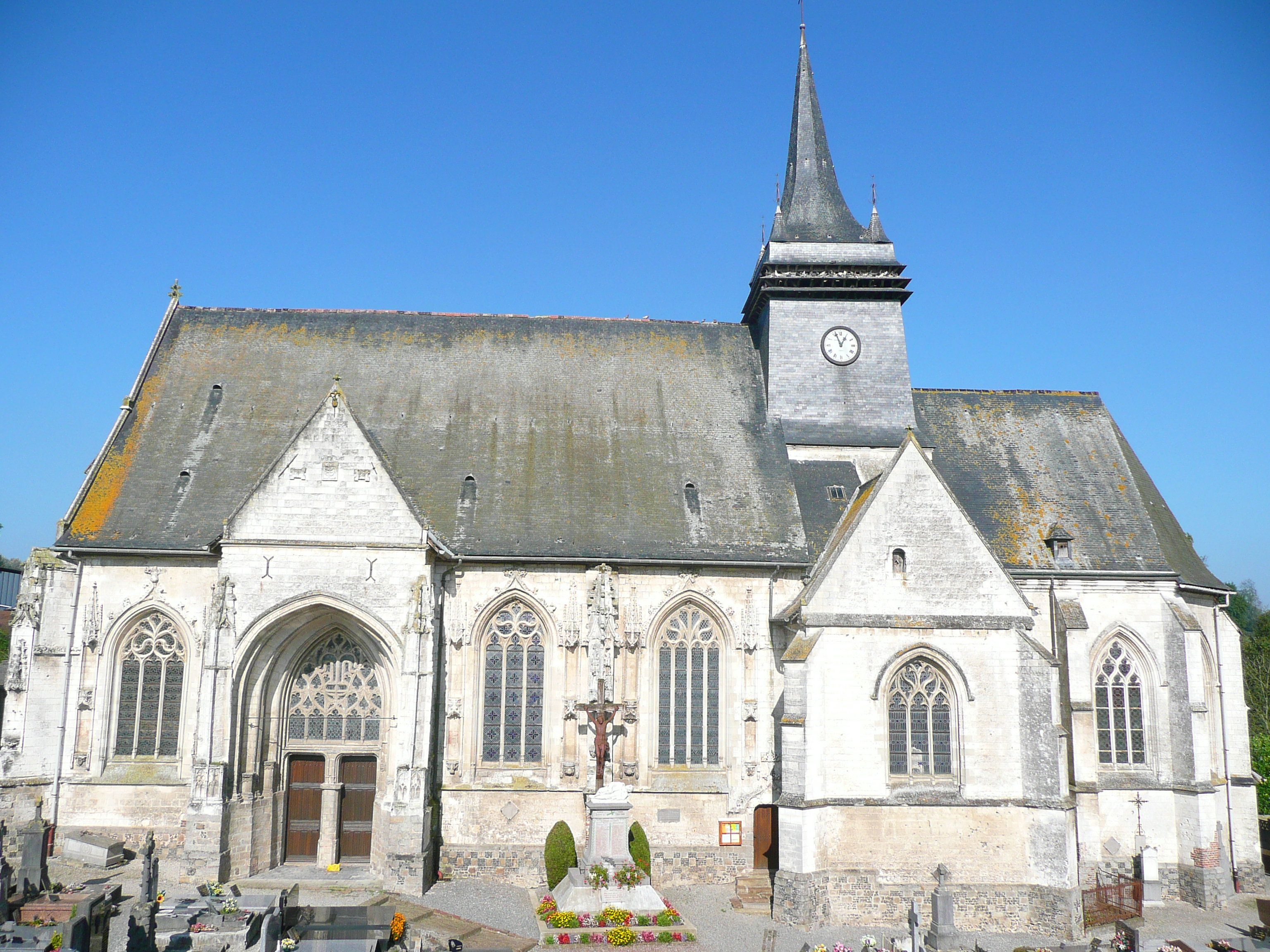 La "Petite Cathédrale"